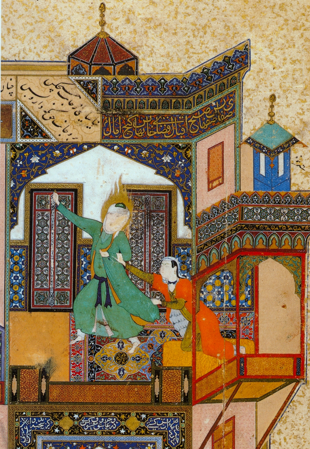 Behzad.__Искушение_Юсуфа,_деталь..